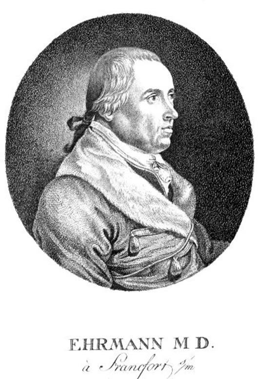 Johann Christian Ehrmann né le 29 avril 1749 à Strasbourg en Alsace et mort le 31 août 1827 à Spire dans le Palatinat du Rhin, est un médecin, essayiste et satiriste germanophone.